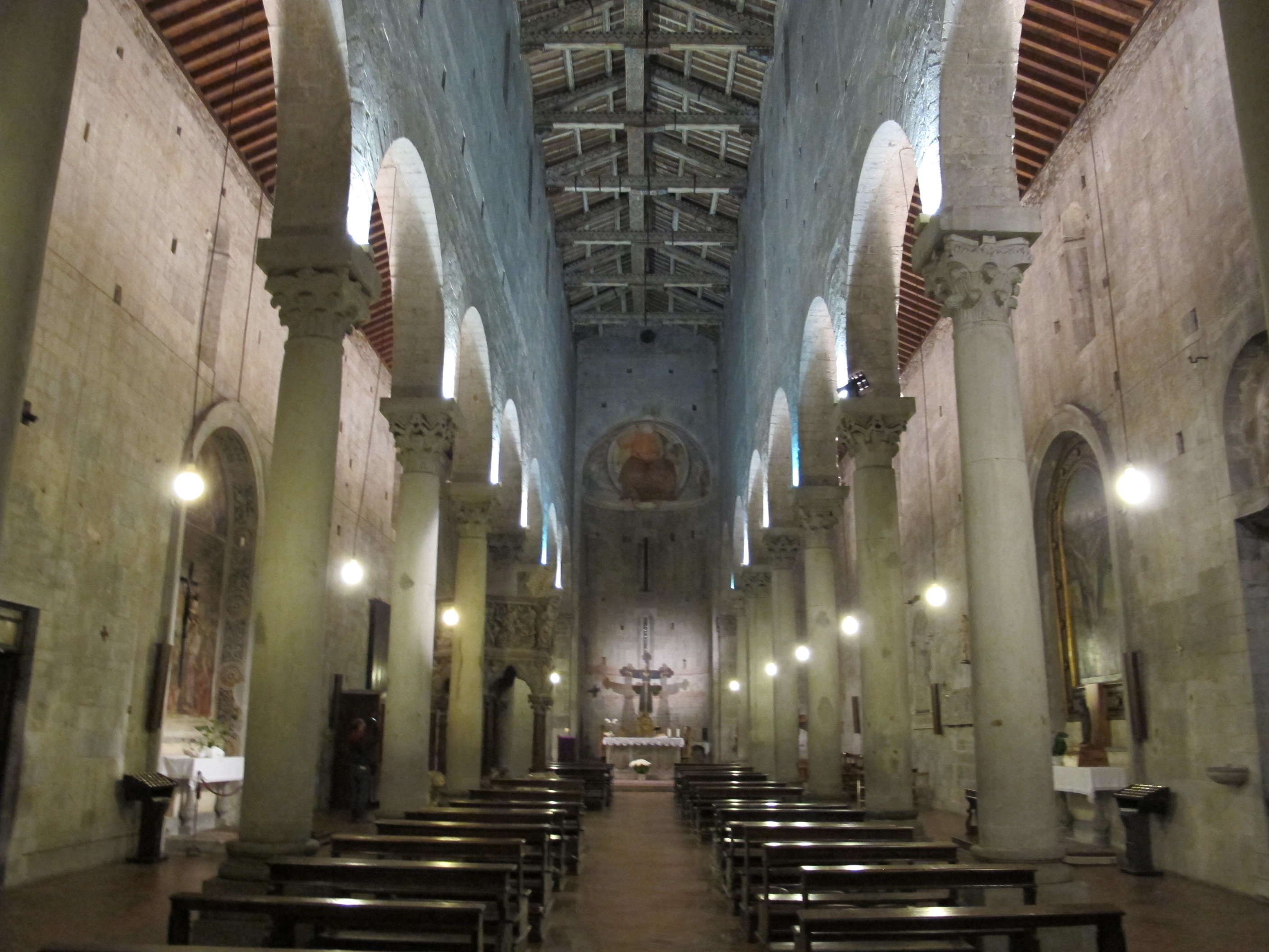 Sant'andrea, pistoia, interno